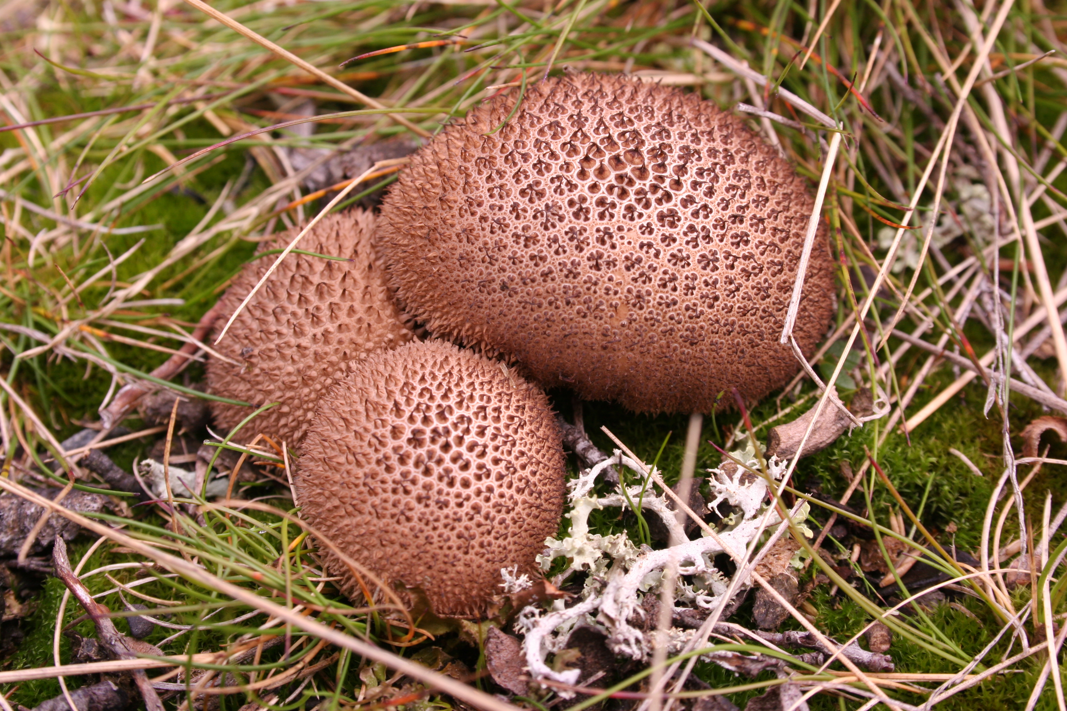 Lycoperdon umbrinum, Gala, Norway